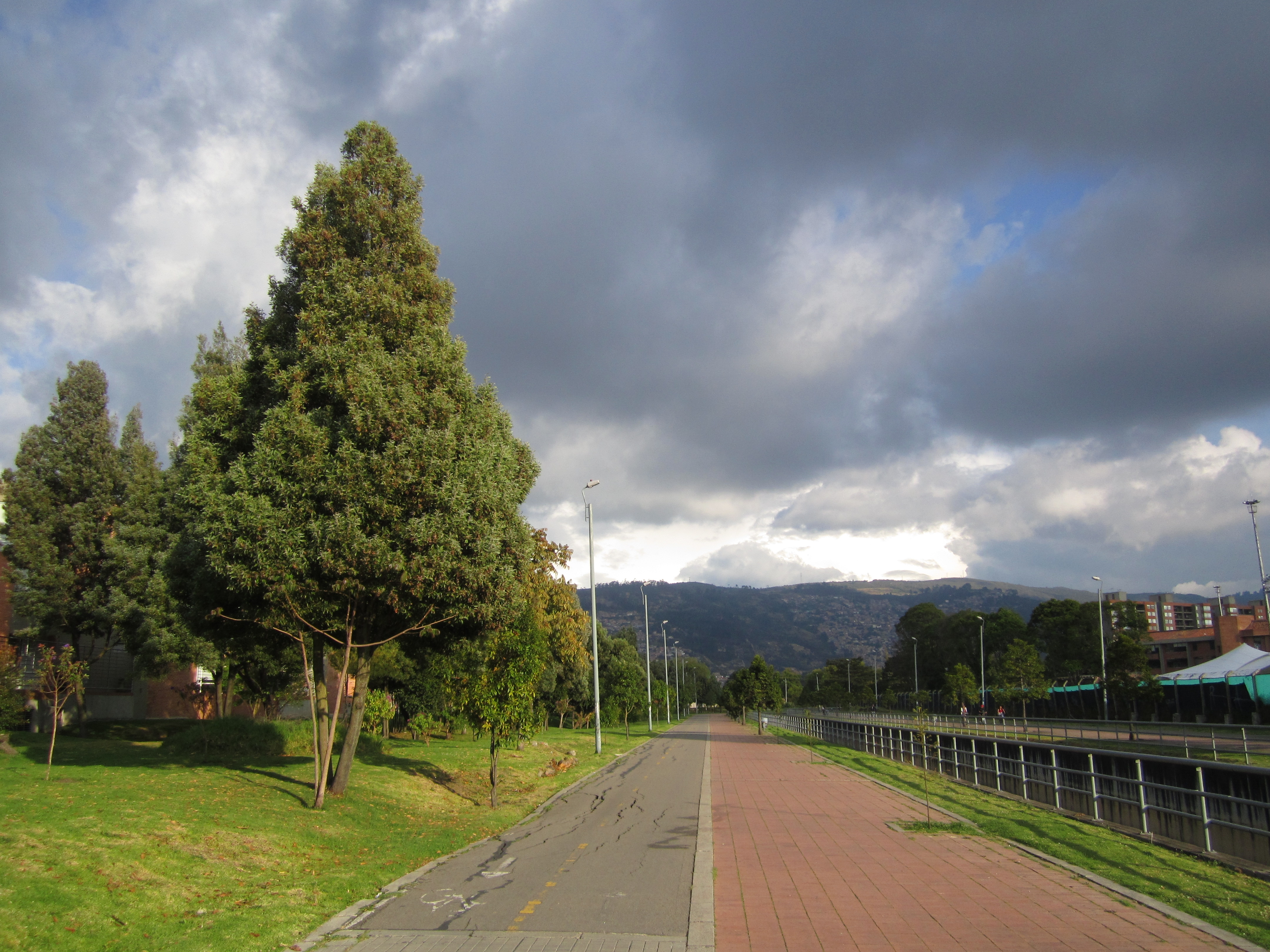 Barrio Cantagallo, localidad de Suba, canal de Córdoba en la calle 161 con carrera 54 Bogotá.